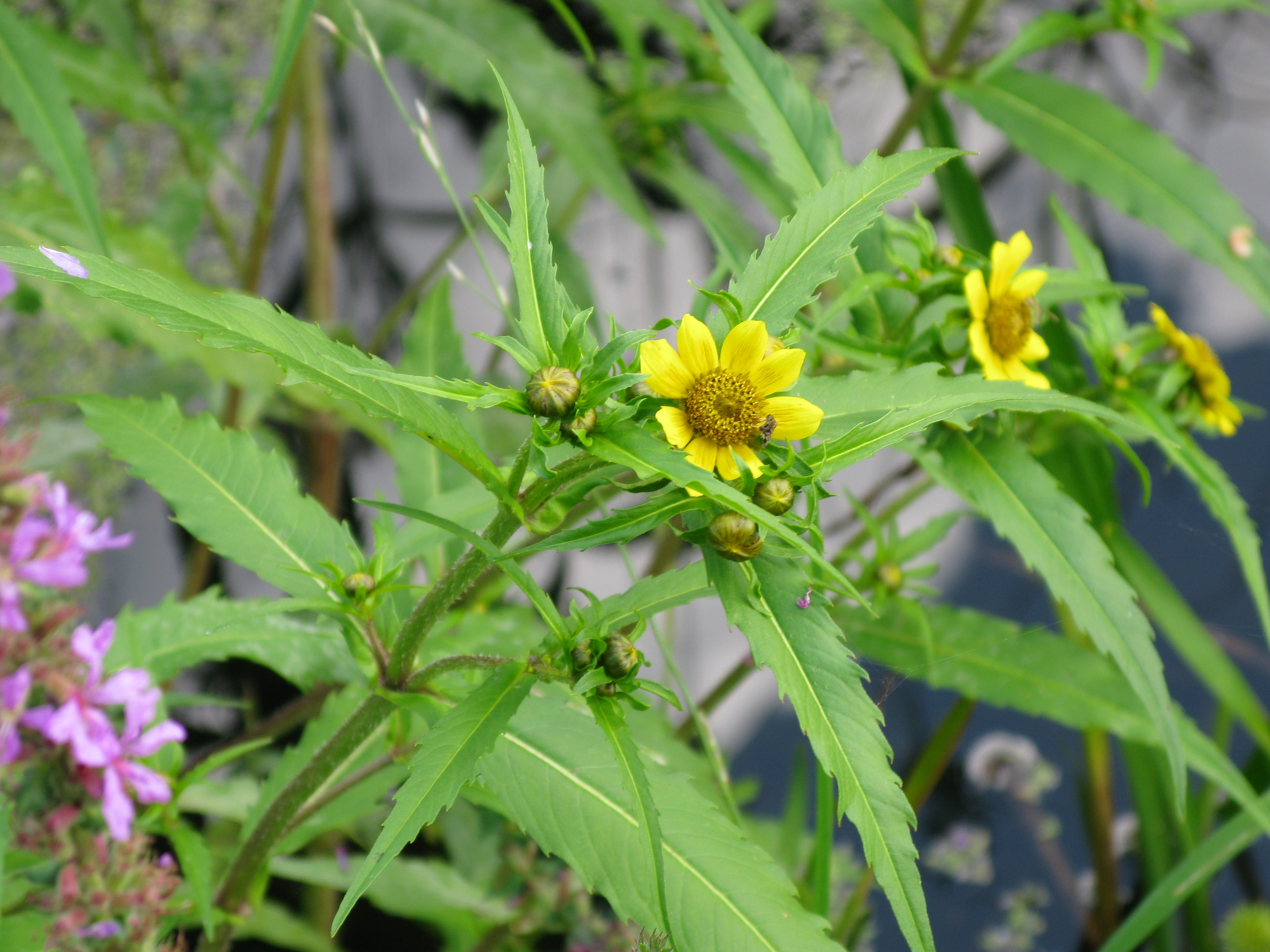 Nickender Zweizahn